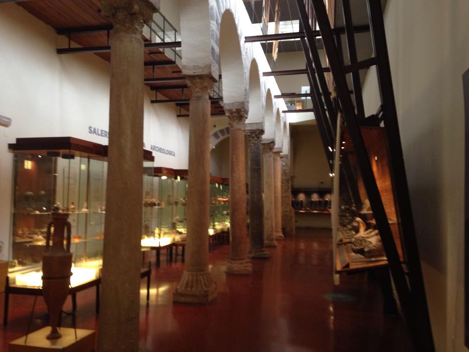 Museo archeologico di Salerno